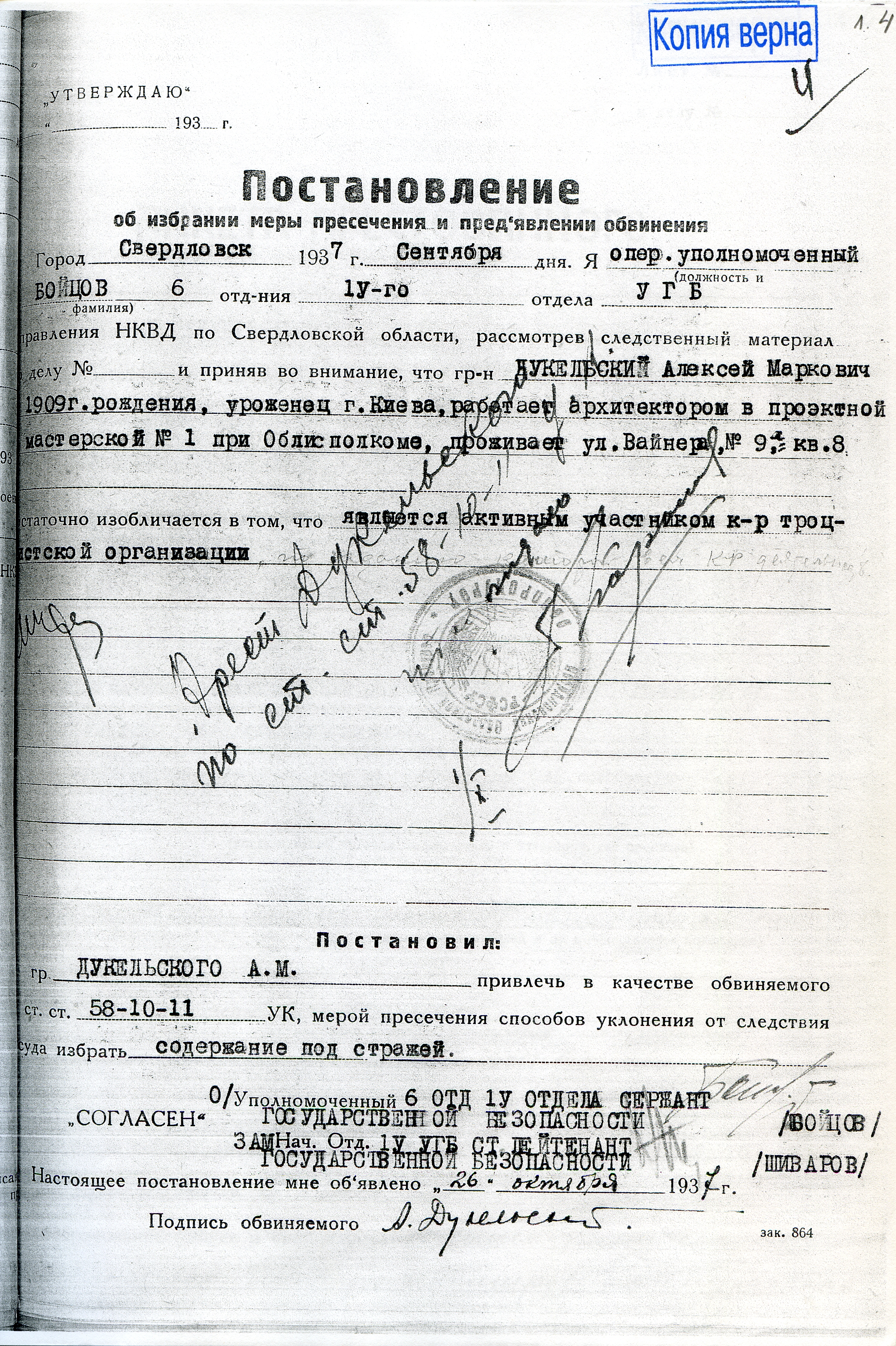 Следственное дело Дукельского Алексея Марковича (арх. №23572-П) / Государственный Архив административных органов Свердловской области (ГААОСО). Ф. Р-1, опись 2, ед.хр. 27569